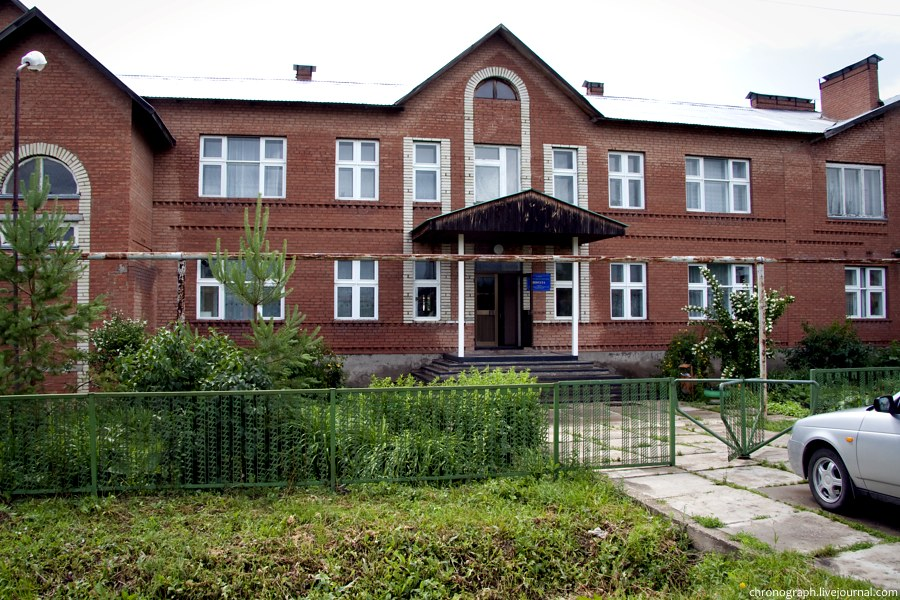 Школа в селе Осиновка, Ставропольский район Самарской области